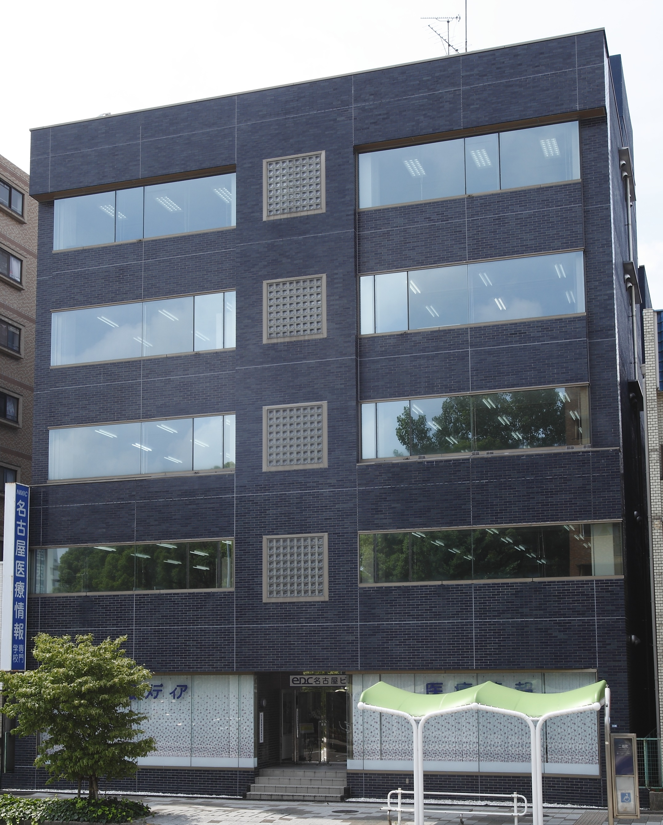 校舎の写真